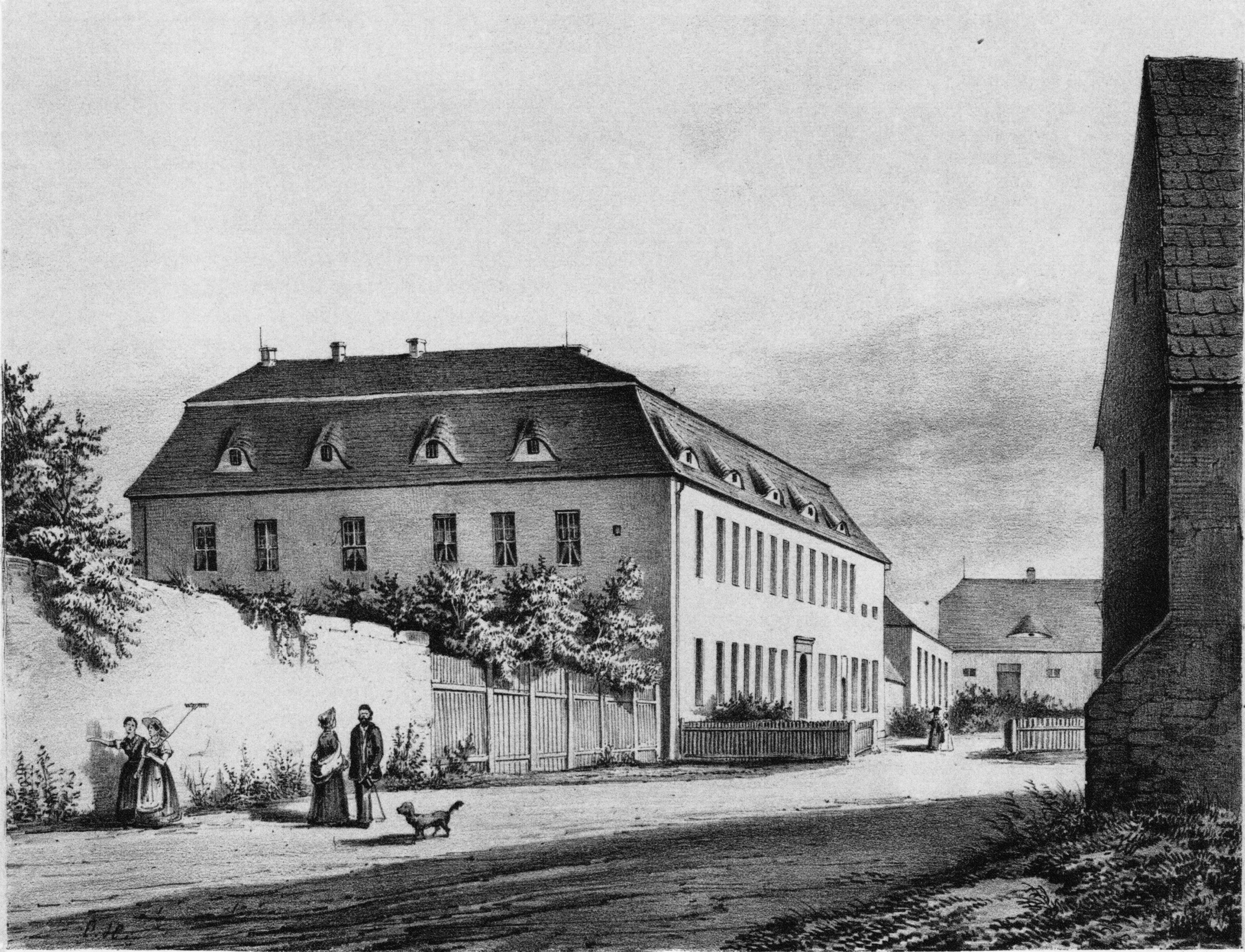 Das Rittergut Glossen Mitte des 19. Jahrhunderts